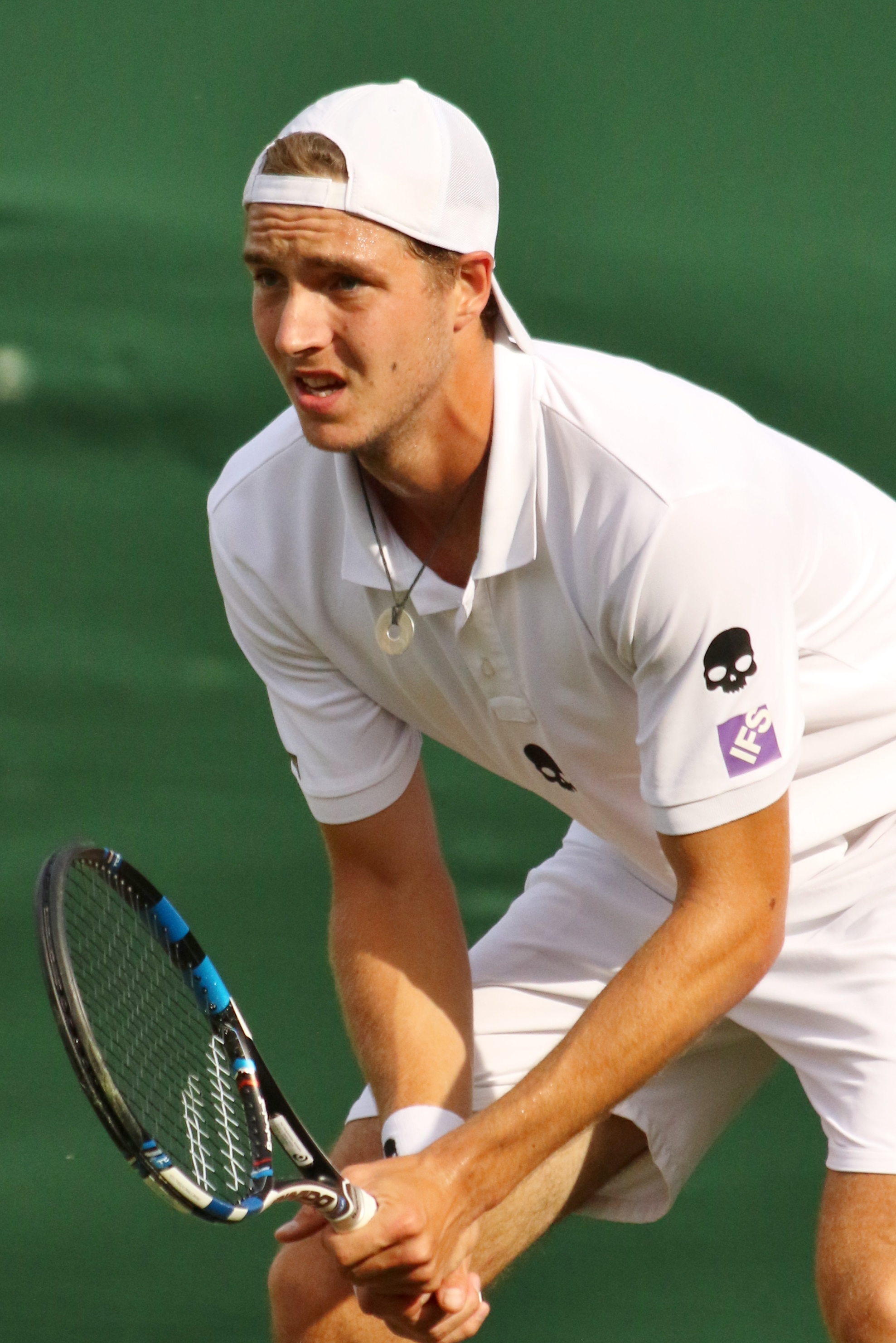 Struff WM16 (20)